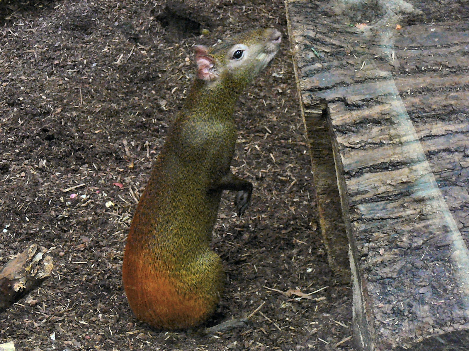 Dasyprocta aguti = Dasyprocta leporina. (goldaguti, agouti doré, en: Brazilian Agouti). Agoutidae. Wilhelma zoo - Stuttgart - Germany